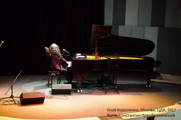 Псой Короленко, концерт в ЦДХ, 20 ноября 2017